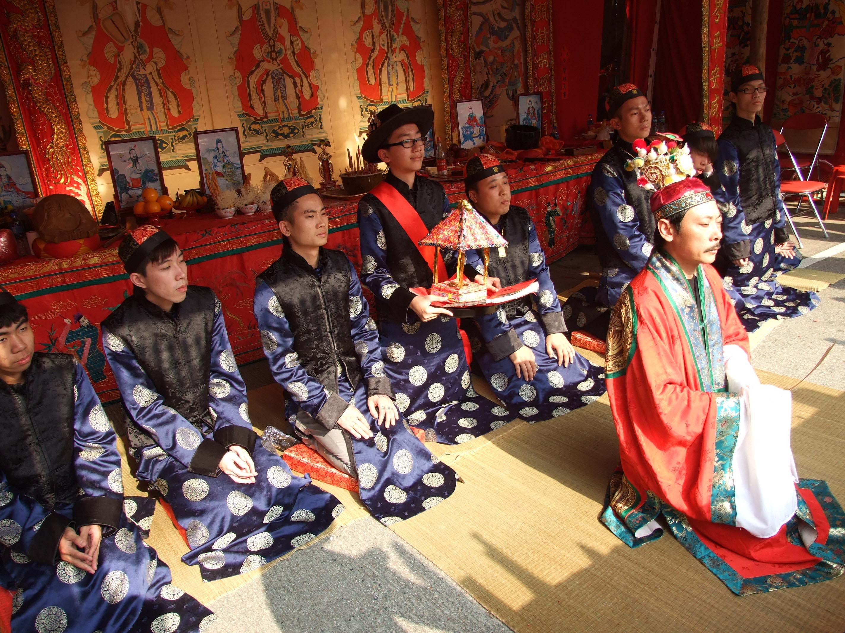 中文（香港）: 粉嶺圍庚寅年太平清醮緣首全為青年人